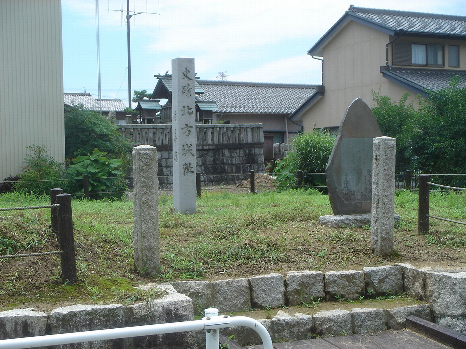 Kitagata Castle Remain（北方城城址）,Kitagata,Gifu,Japan(岐阜県北方町)で撮影。